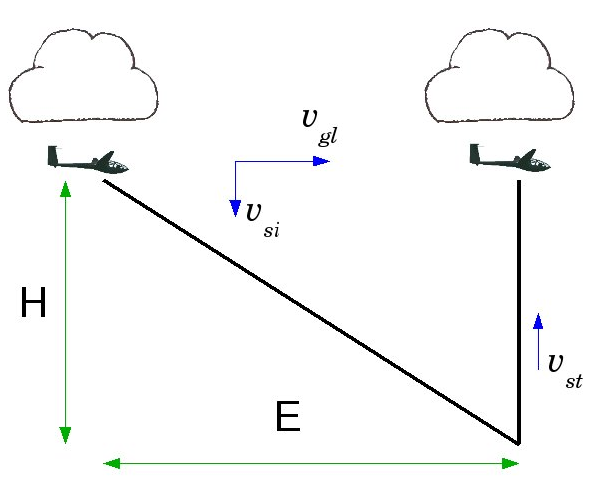 Modell zum Streckensegelflug